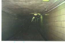 Подземный переход у станции метро Выборгская